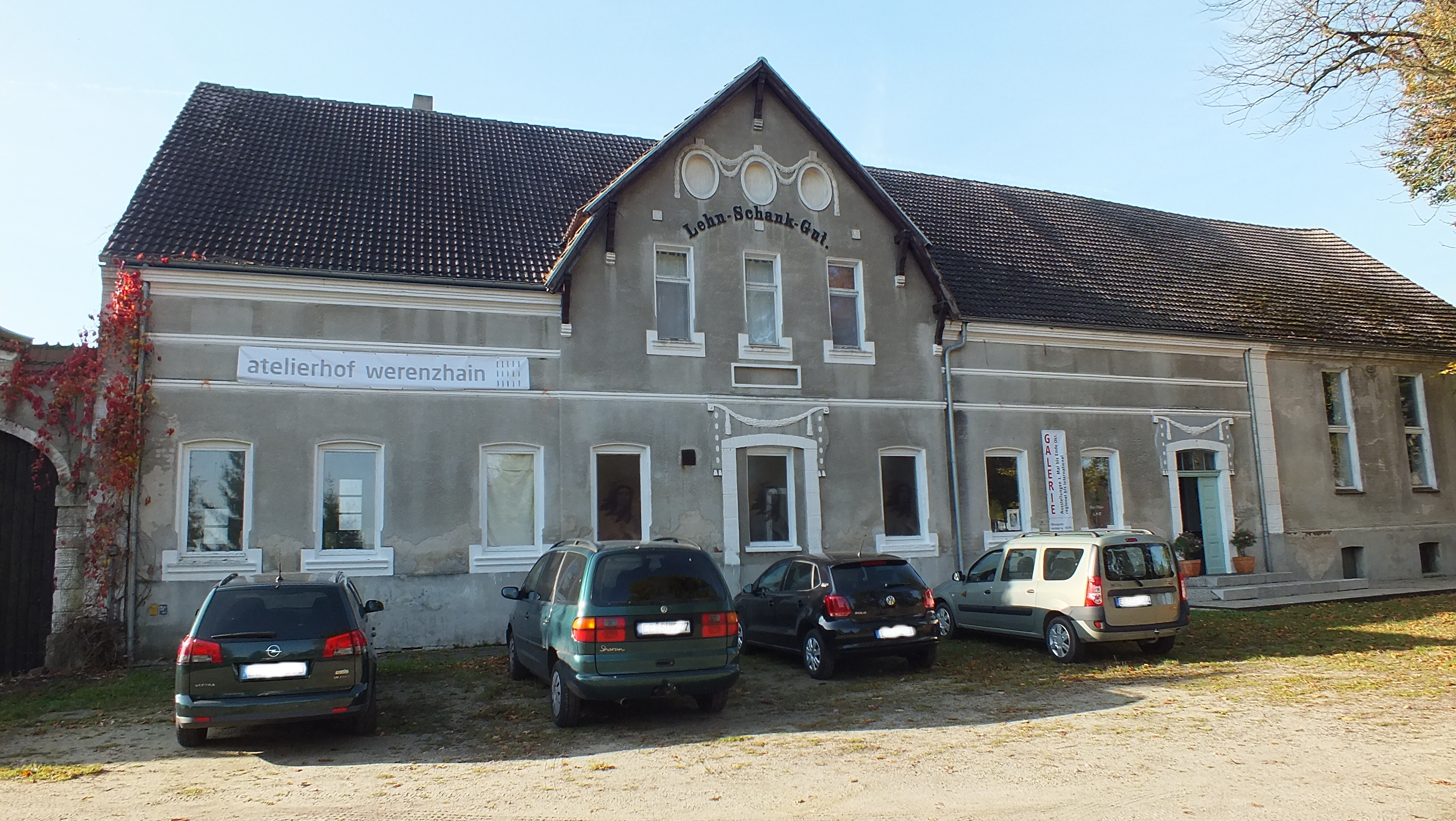 Denkmalgeschützter Lehn- Schank Gutshof in Werenzhain